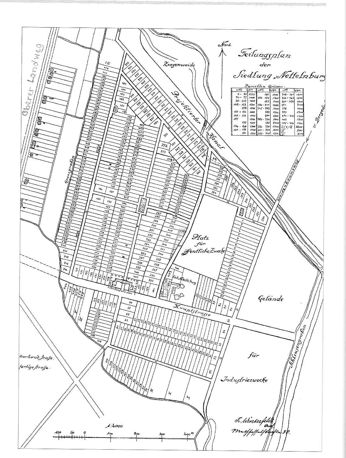 Teilungsplan der Siedlung Nettelnburg; Grundriss für das Katasteramt. Original befindet sich im Bezirksamt Bergedorf.